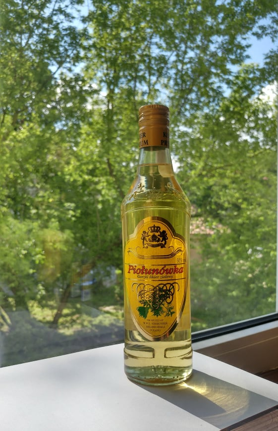 Piołunówka от компании Nisshosher